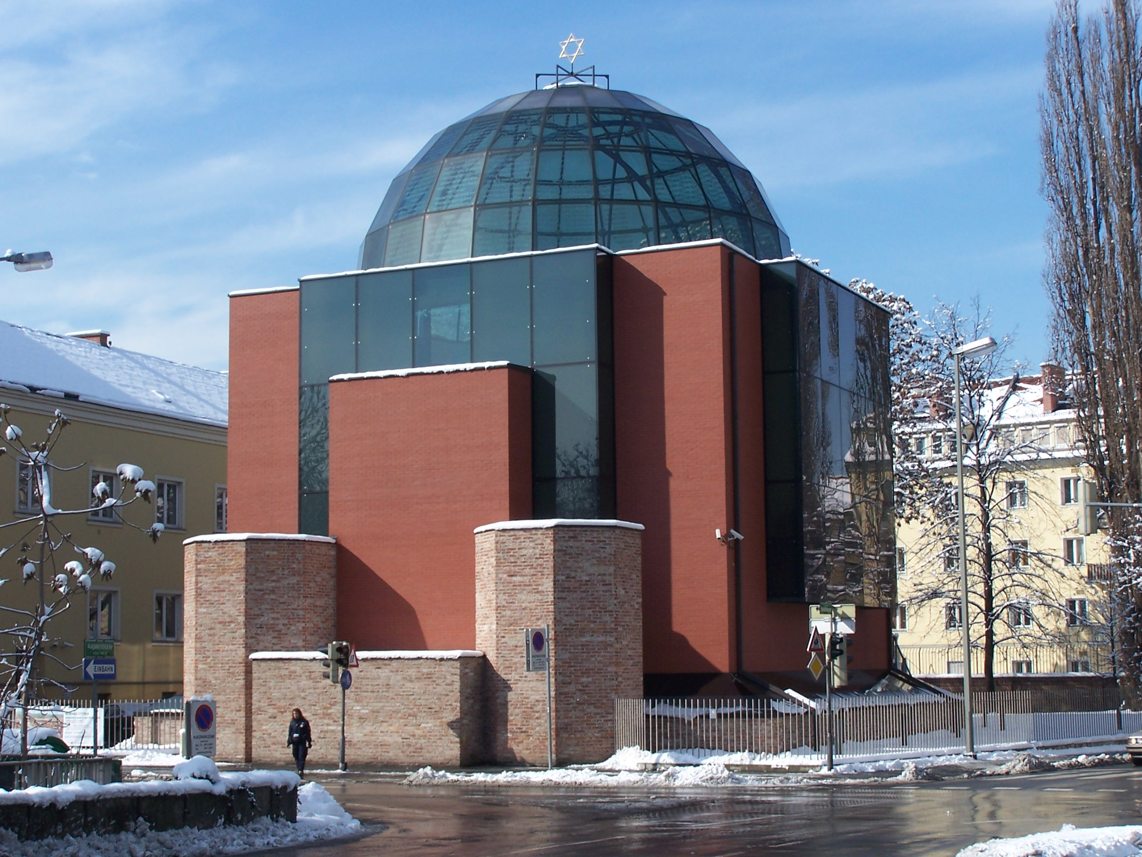 Synagoge der Israelitische Kultusgemeinde Graz